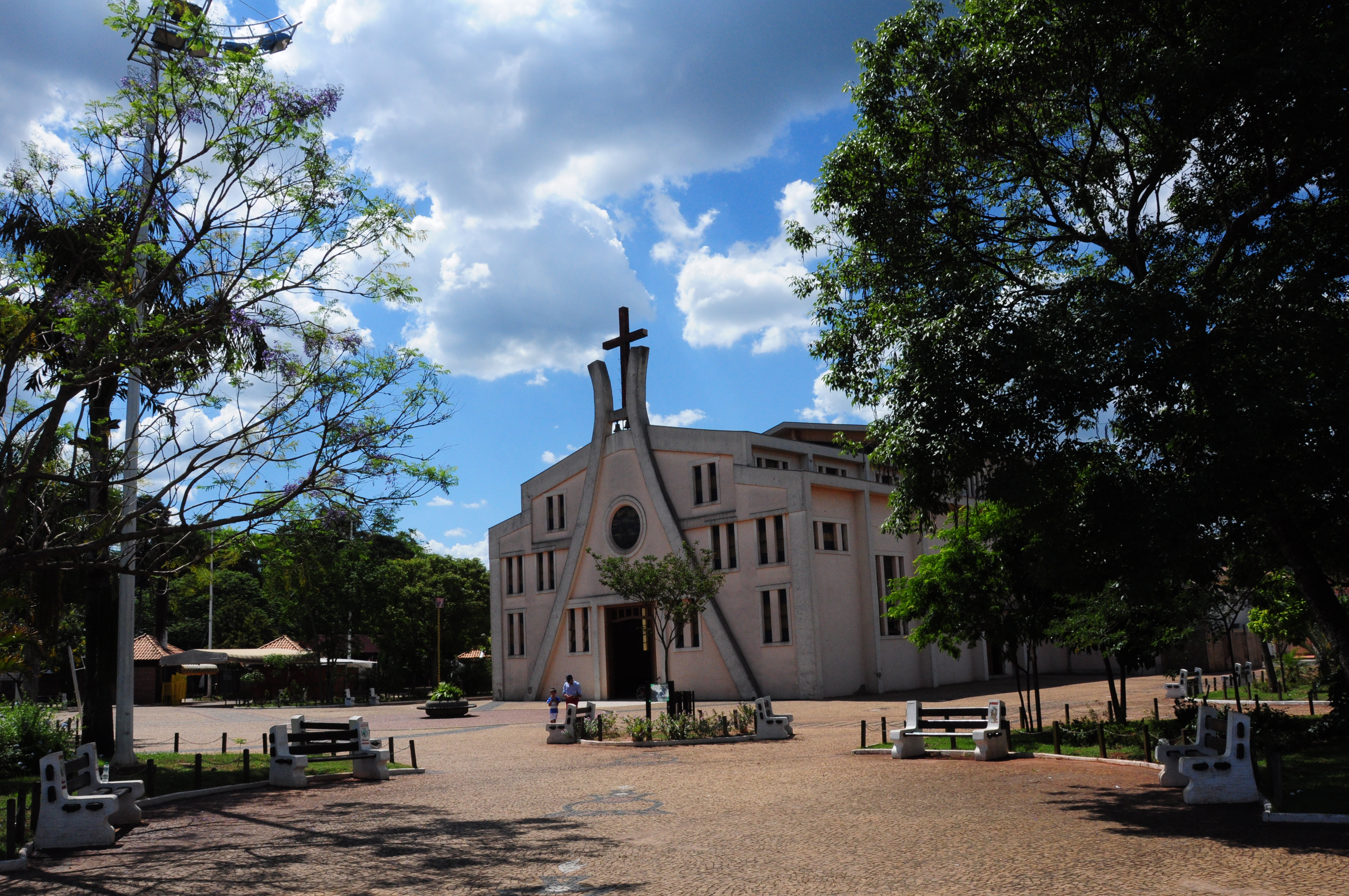 Igreja 2013-11-29